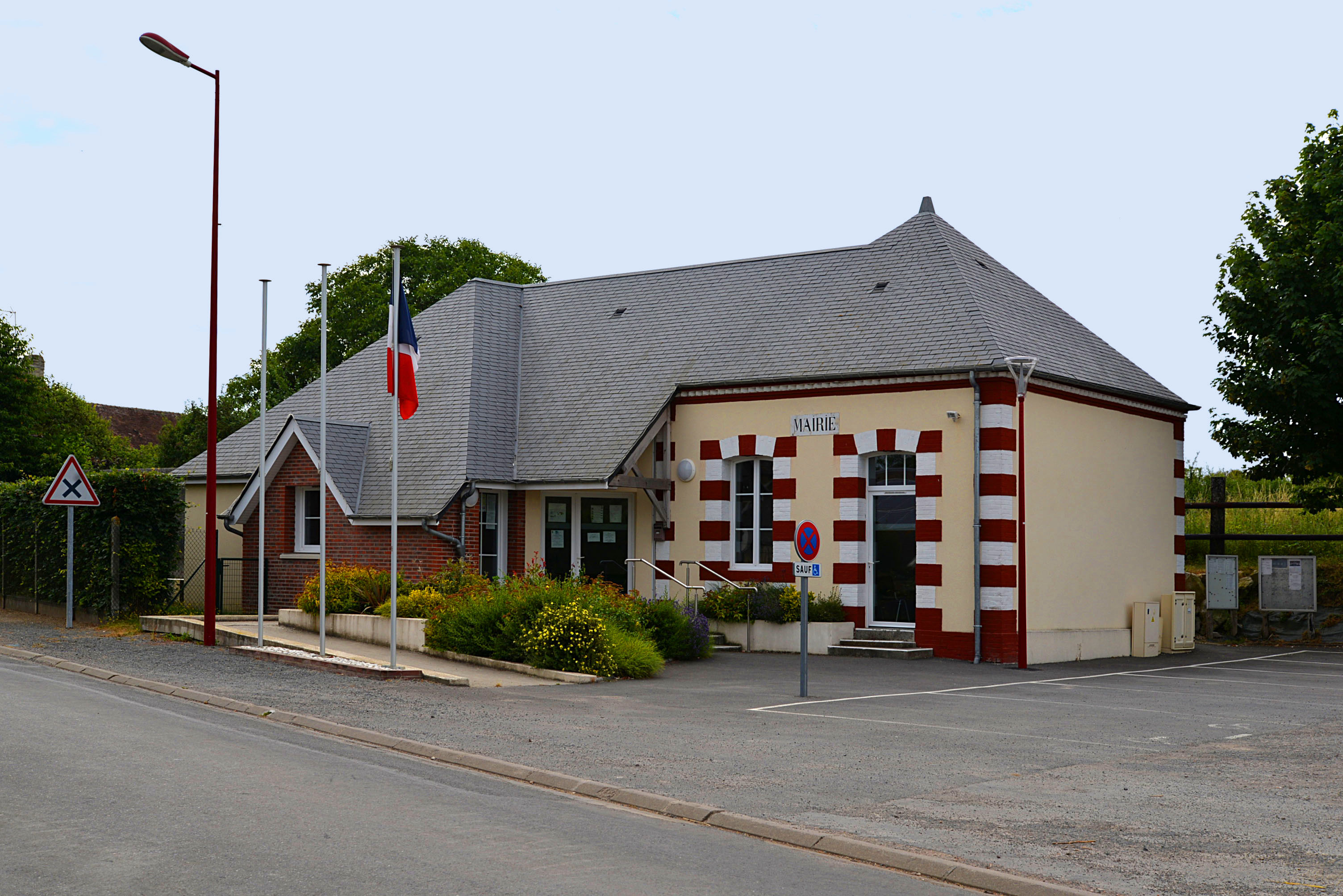 Fierville-Bray (14)